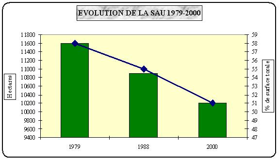 La SAU (Surface agricole utilisée) des Monts de Châlus entre 1979 et 2000